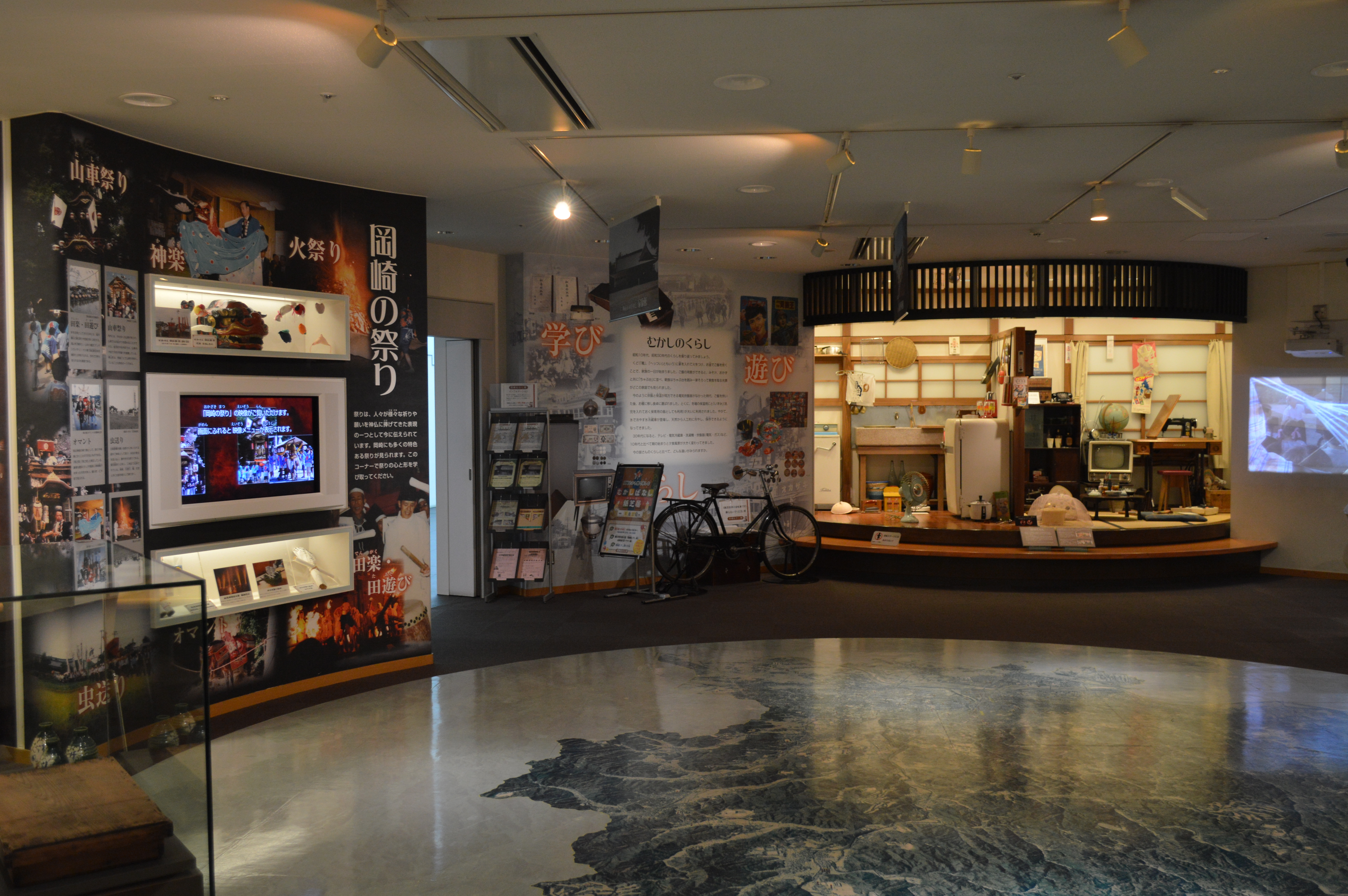 岡崎市図書館交流プラザ（岡崎市立中央図書館） 。1階の岡崎むかし館。